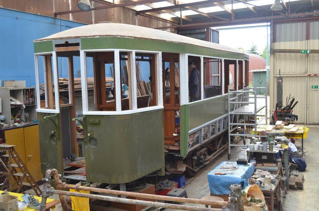 Bijwagen "NBM 55" bij de Electrische Museumtramlijn Amsterdam, Remise Karperweg; 20 september 2012. Foto: Erik Swierstra.